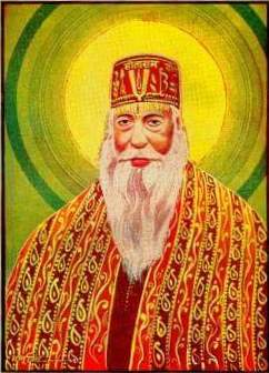 रसिकोपासना के महान अाचार्य , अनेक विशिष्ट ग्रन्थों के प्रणेता एवं श्री लक्ष्मण किला के संस्थापक